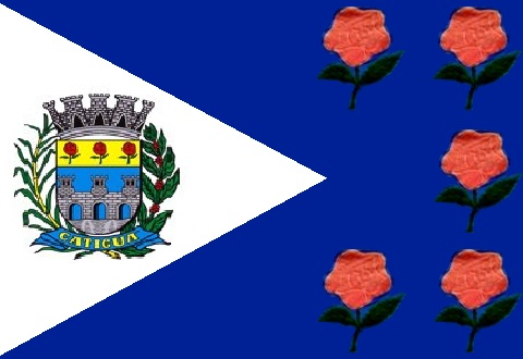 Réplica da Bandeira do Município de Catiguá